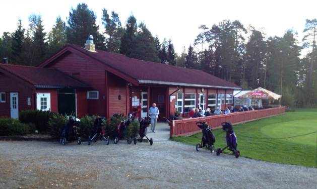 Klubbhus, kafeteria på Grønmo Golfbane, Oslo